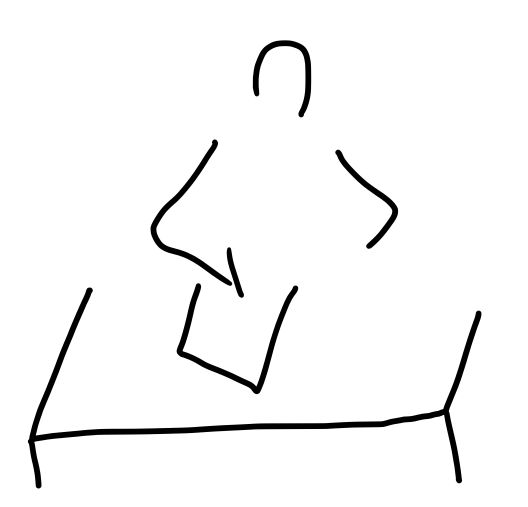 Ein einfaches Strichmännchen, die Illustration zeigt einen Autor oder Zeichner / Illustrator, der an einem Tisch etwas schreibt / zeichnet.